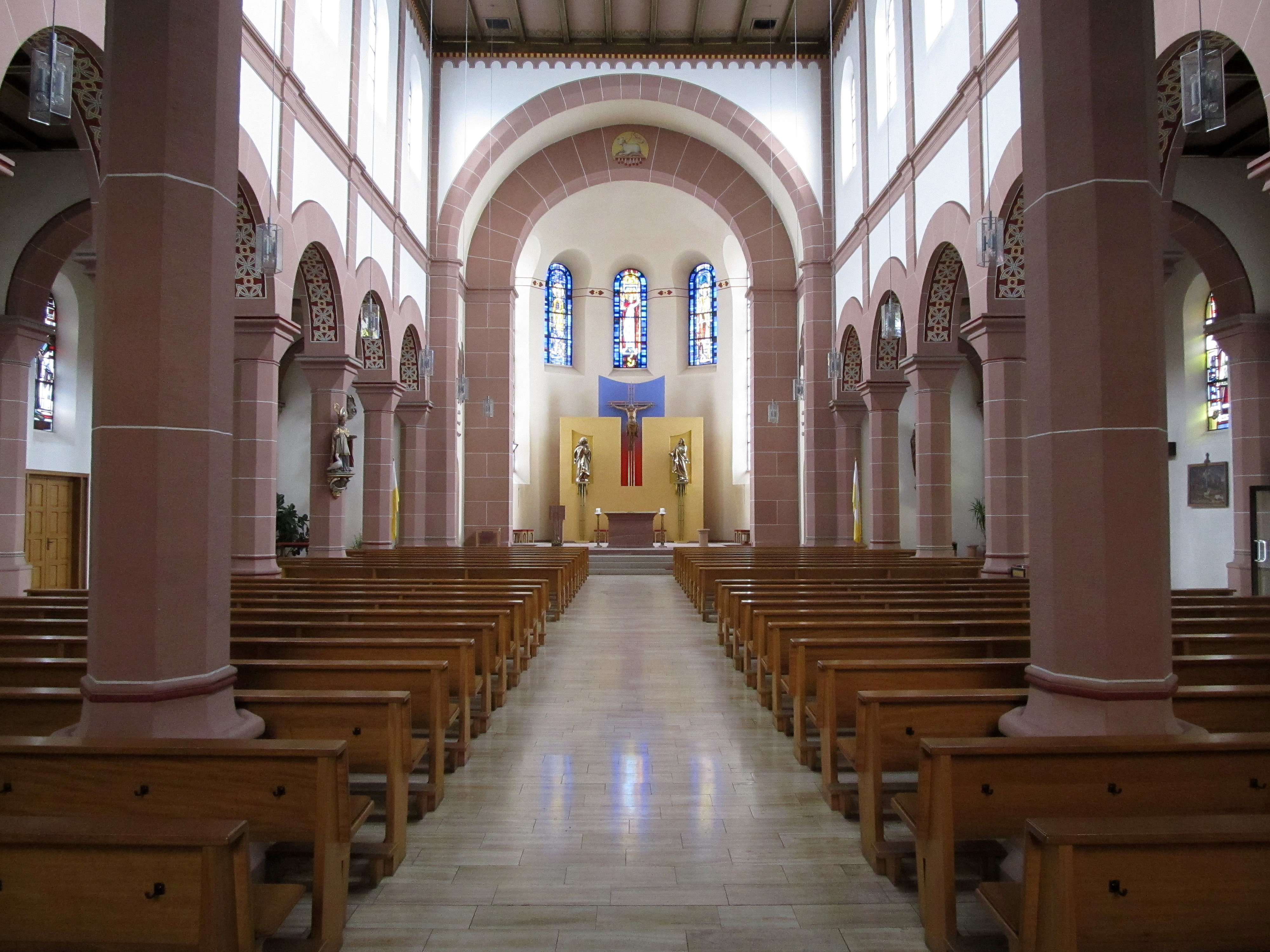 Blick ins Innere der katholischen Pfarrkirche St. Martin in Bexbach, Saarland